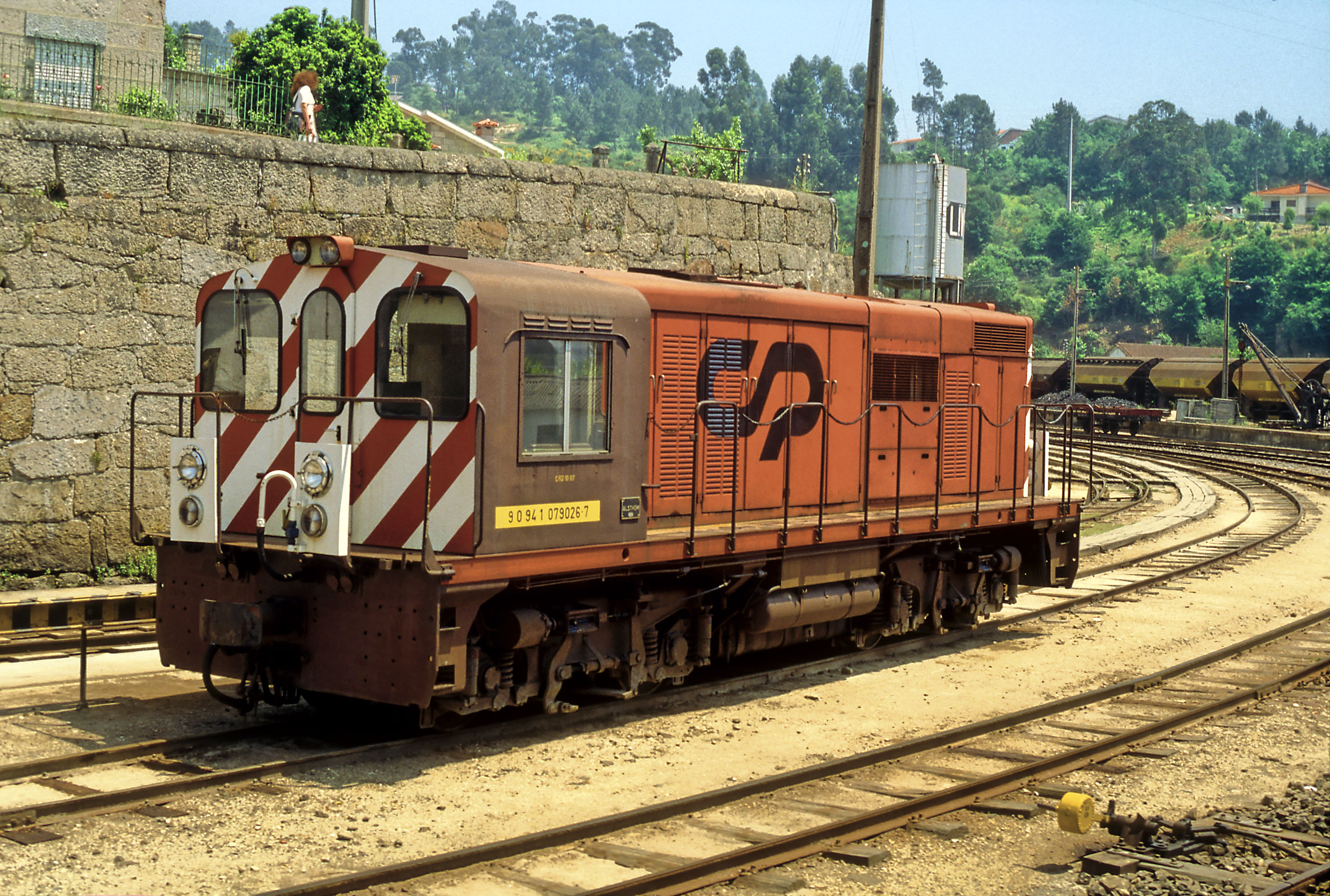 Auf mehreren Spurweiten einsetzbare Lokomotive. Auffällig sind die mehrfach gebohrten Kopfstücke zur Anpassung der Zug- und Stoßvorrichtungen. Die Seitenpuffer können im europäischen (1750mm) und iberischen (1950mm) Abstand eingebaut werden.